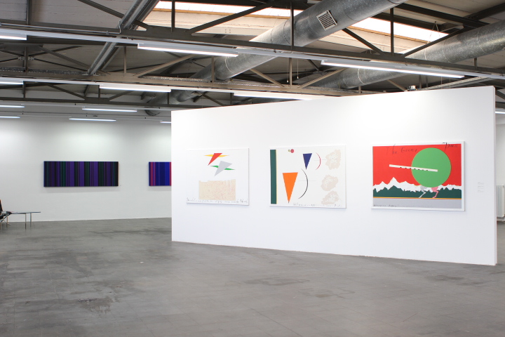 Blick in den Galierieraum während der Ausstellung "Text-Bild-Konzepte". Im Bild zu sehen sind Arbeiten von Pavel Pepperstein (Vordergrund) und Milovan DeStil Markovic (Hintergrund).